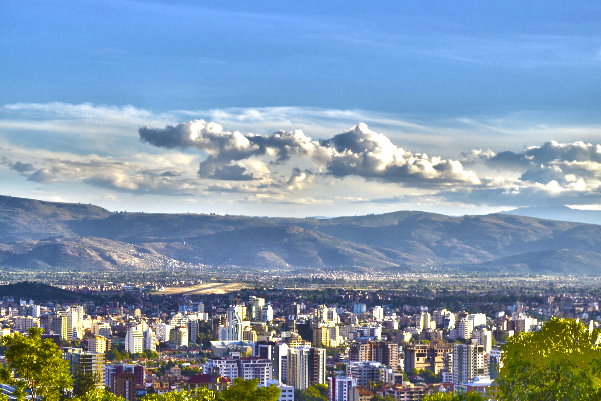 Panorama de la zona sur de Cochabamba desde la Cordillera Tunari